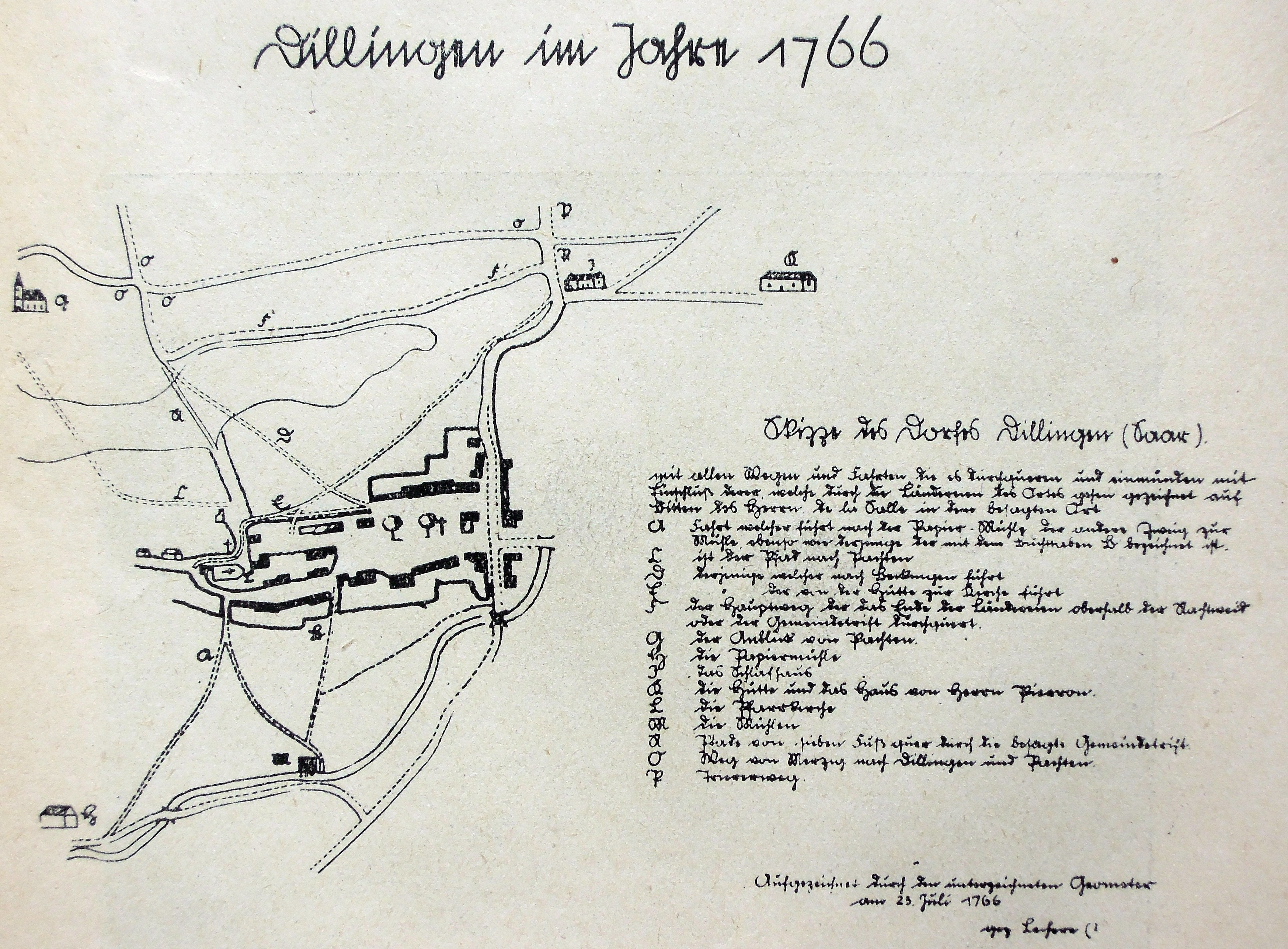 Karte von Dillingen/Saar im Jahr 1766